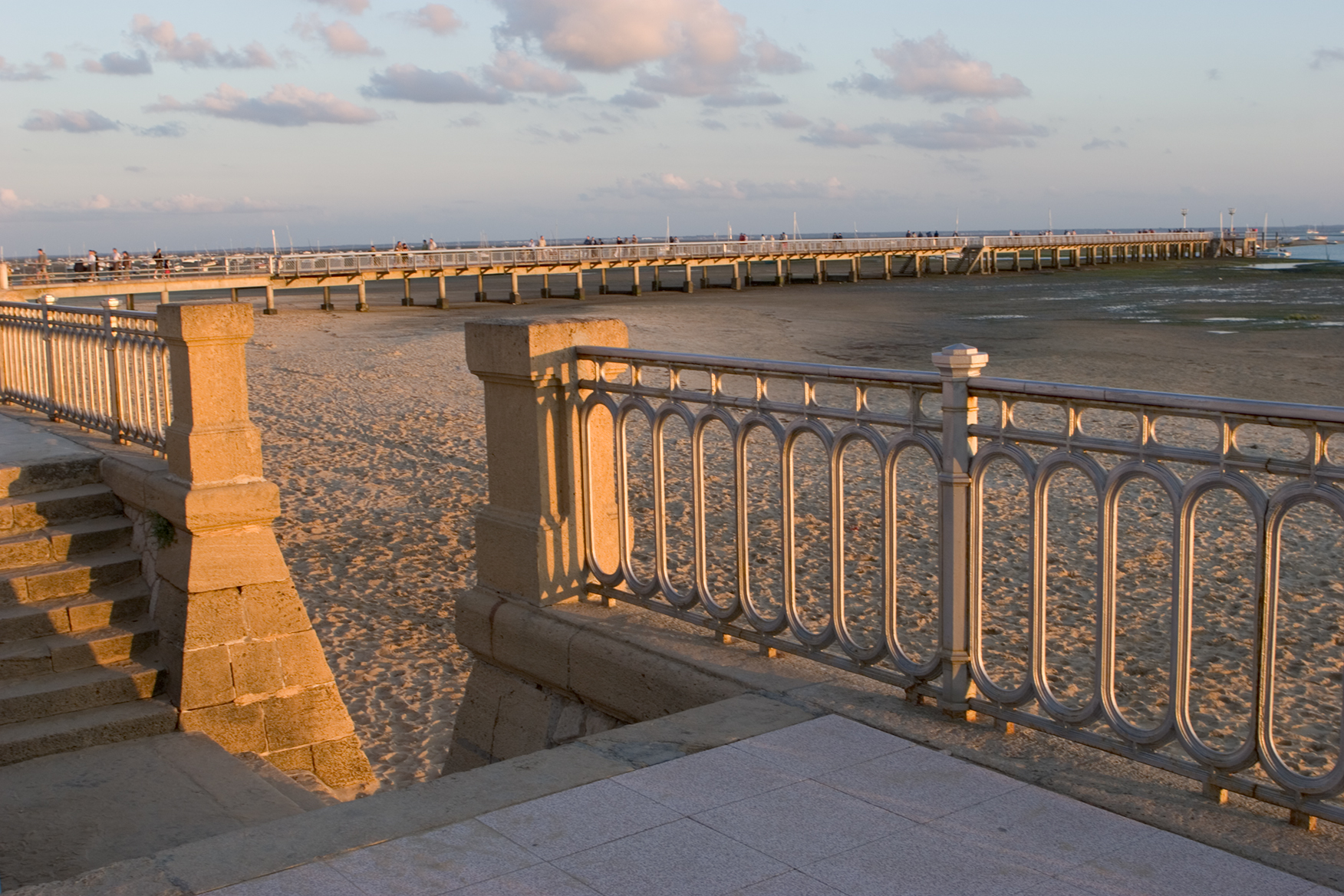 Andernos.